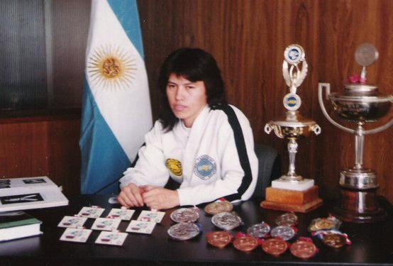 noemi prone